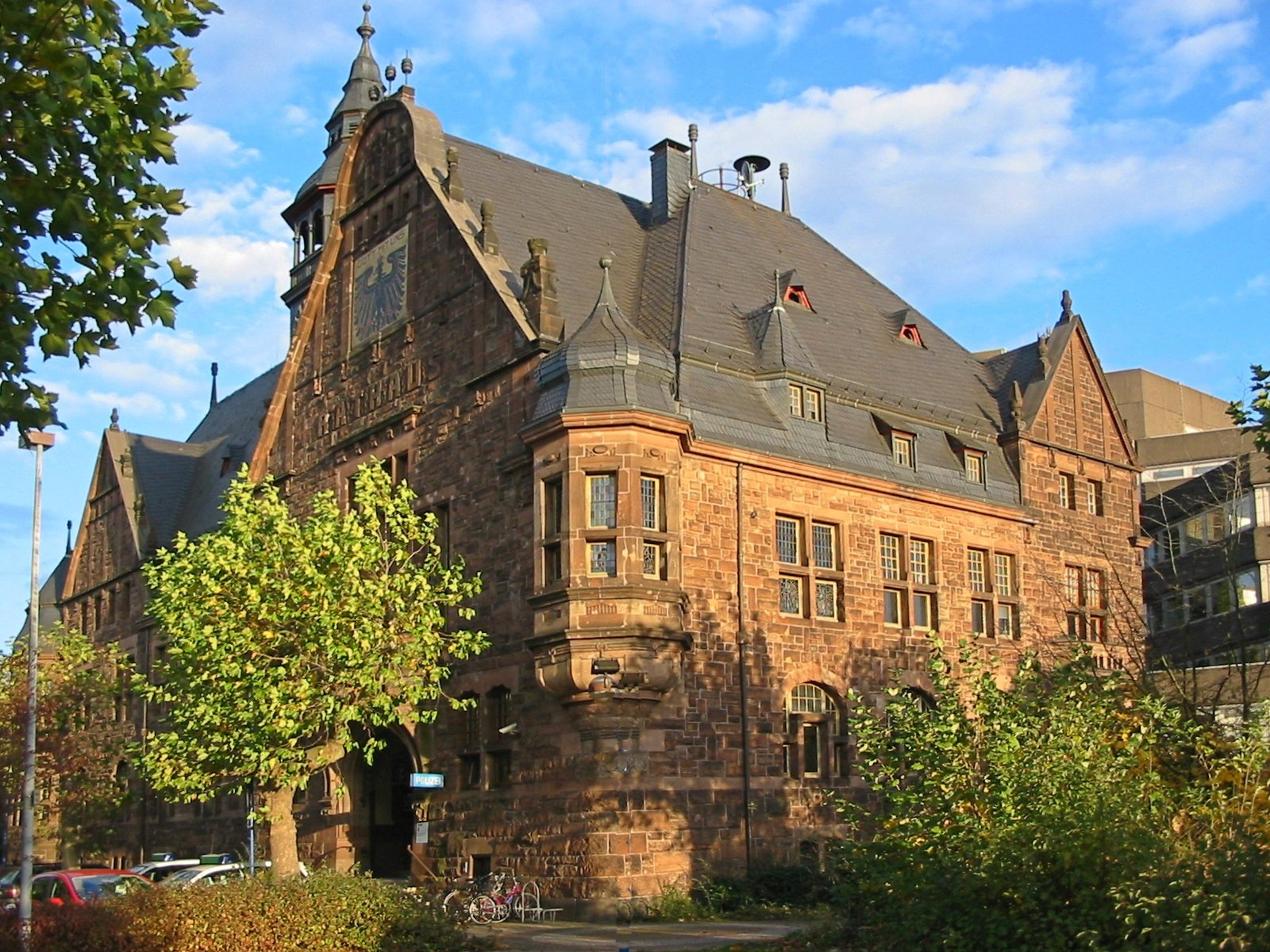 Polizei (altes Rathaus) Dillingen